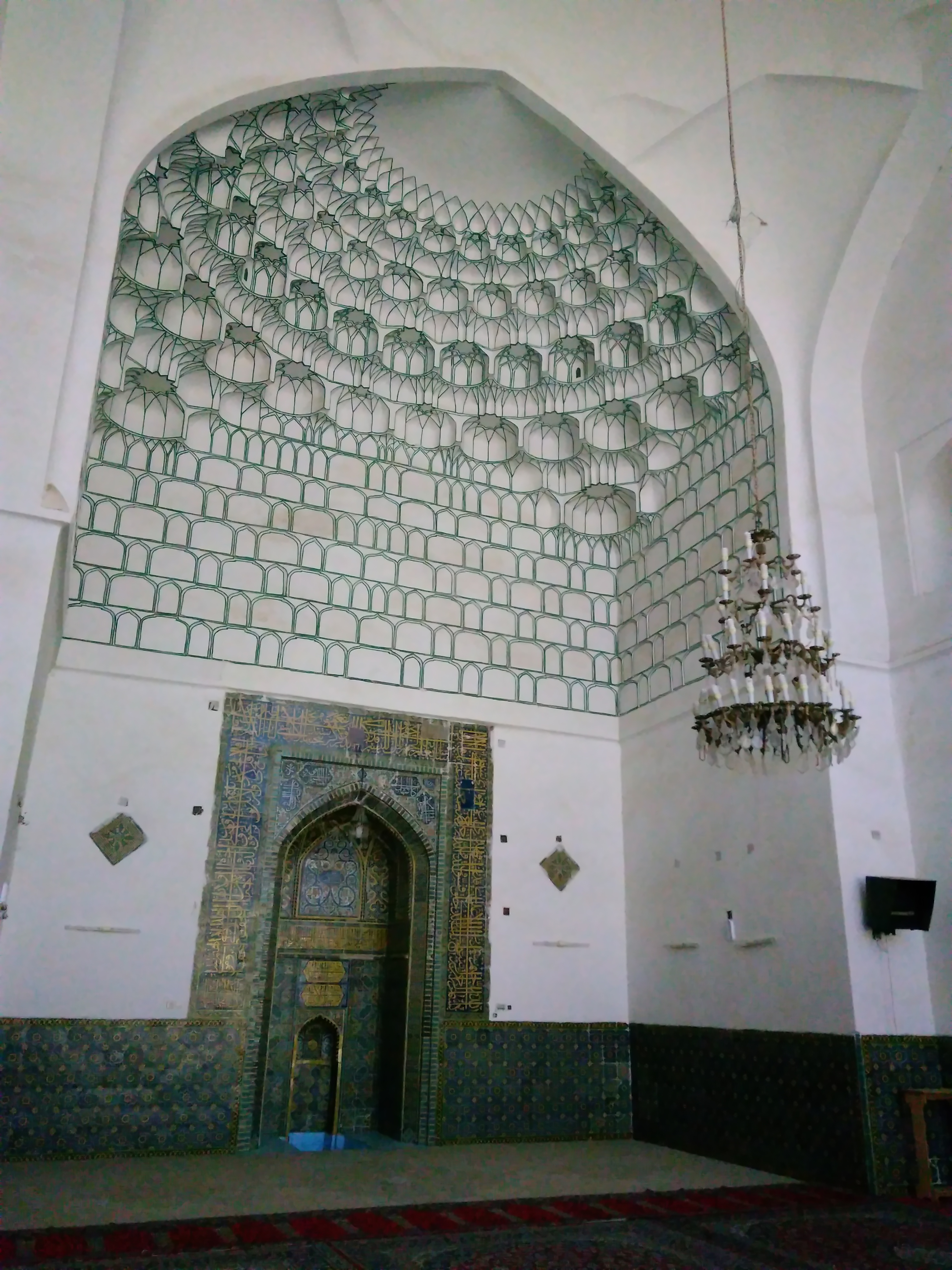 مسجد جامع کاشمر